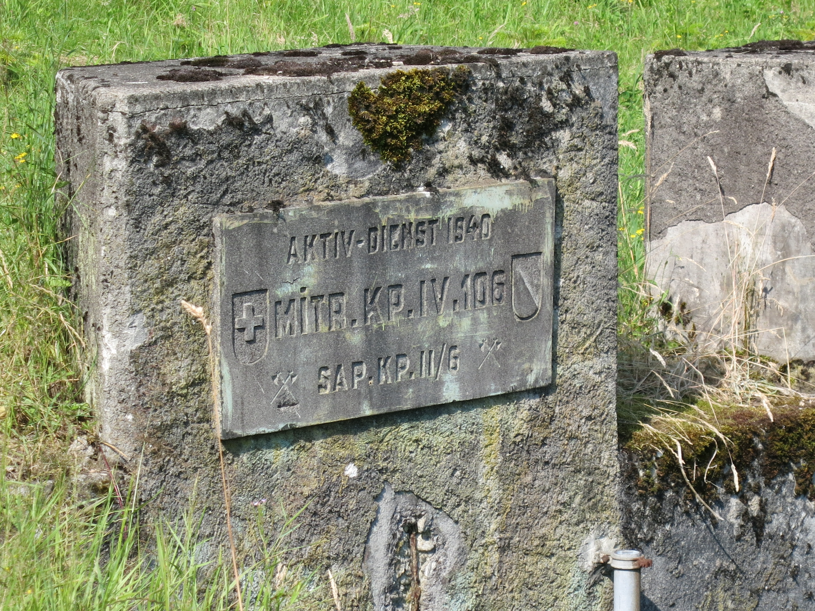 Festung Uetliberg, Waldegg, Zürich, Schweiz